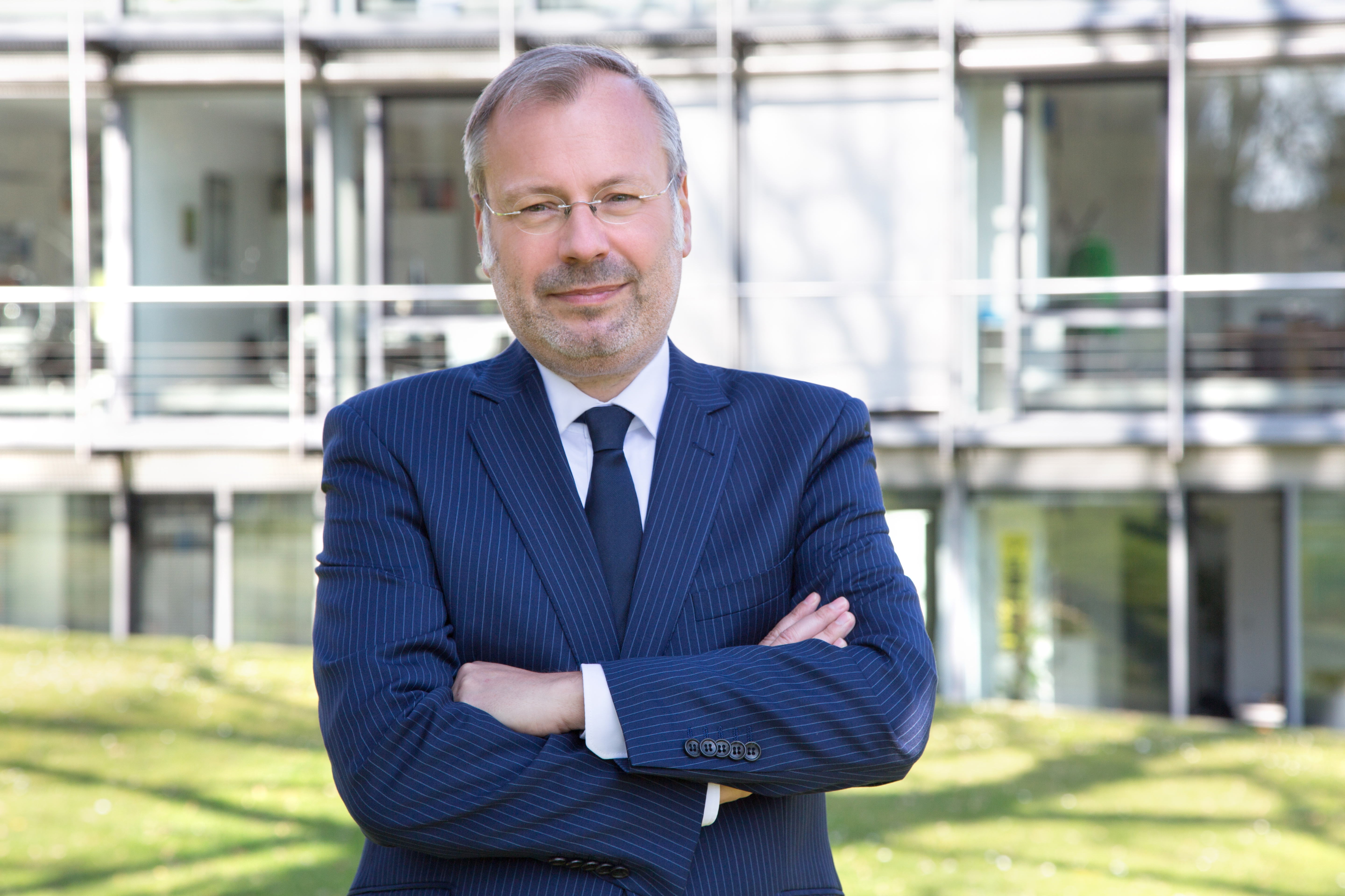 Steffen Saebisch, Potsdam-Griebnitzsee